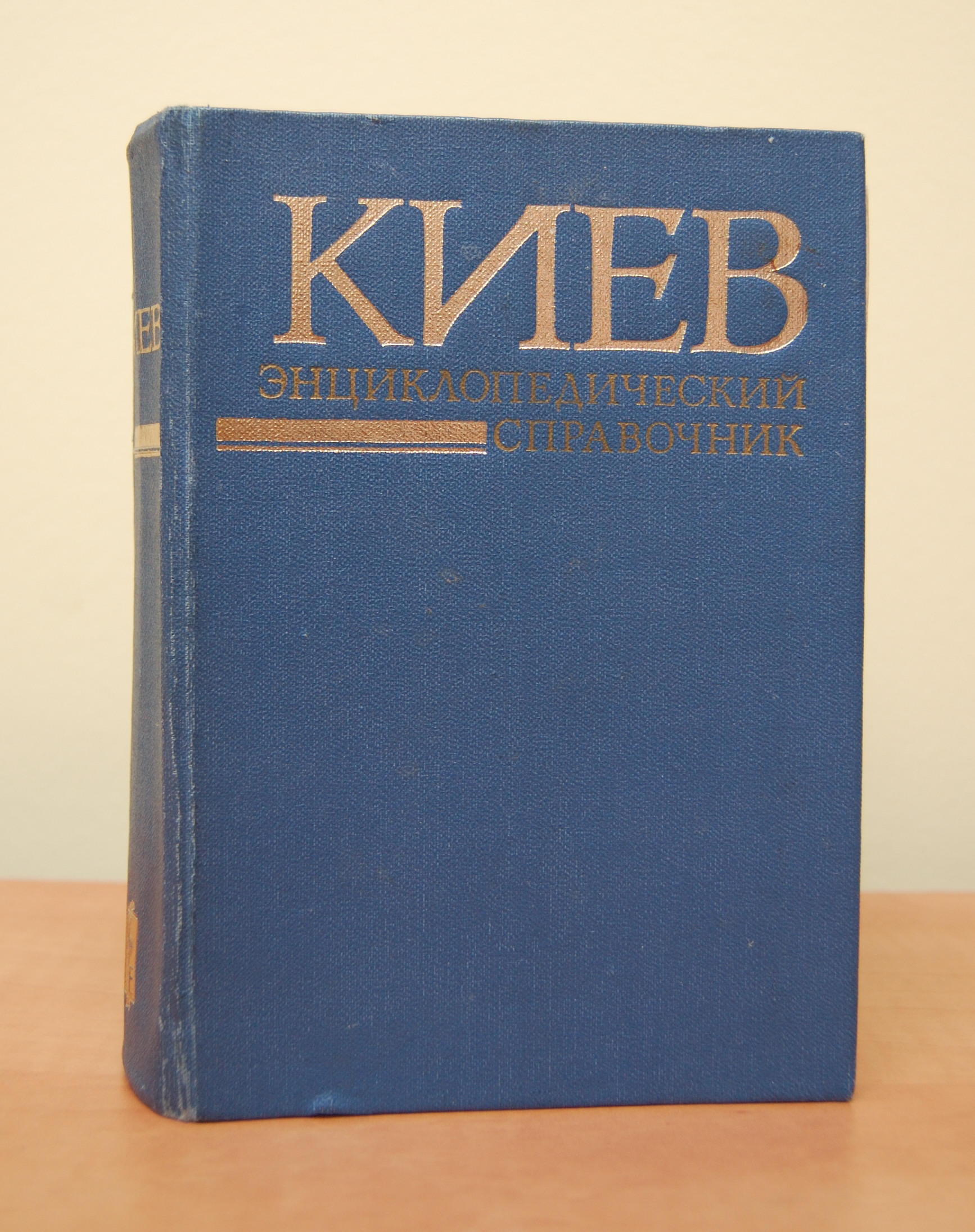 Энциклопедический справочник «Киев» / Под. ред. А. В. Кудрицкого. — Киев: Главная редакция Украинской Советской Энциклопедии, 1982. — 704 с.